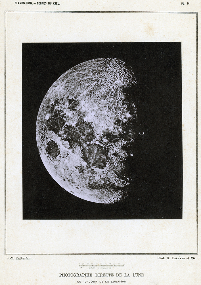 Photogravure d'un cliché de la lune réalisé par L M Rutherfurd au XIXème siècle et paru dans l'ouvrage de Flammarion "Terres du ciel" 1877